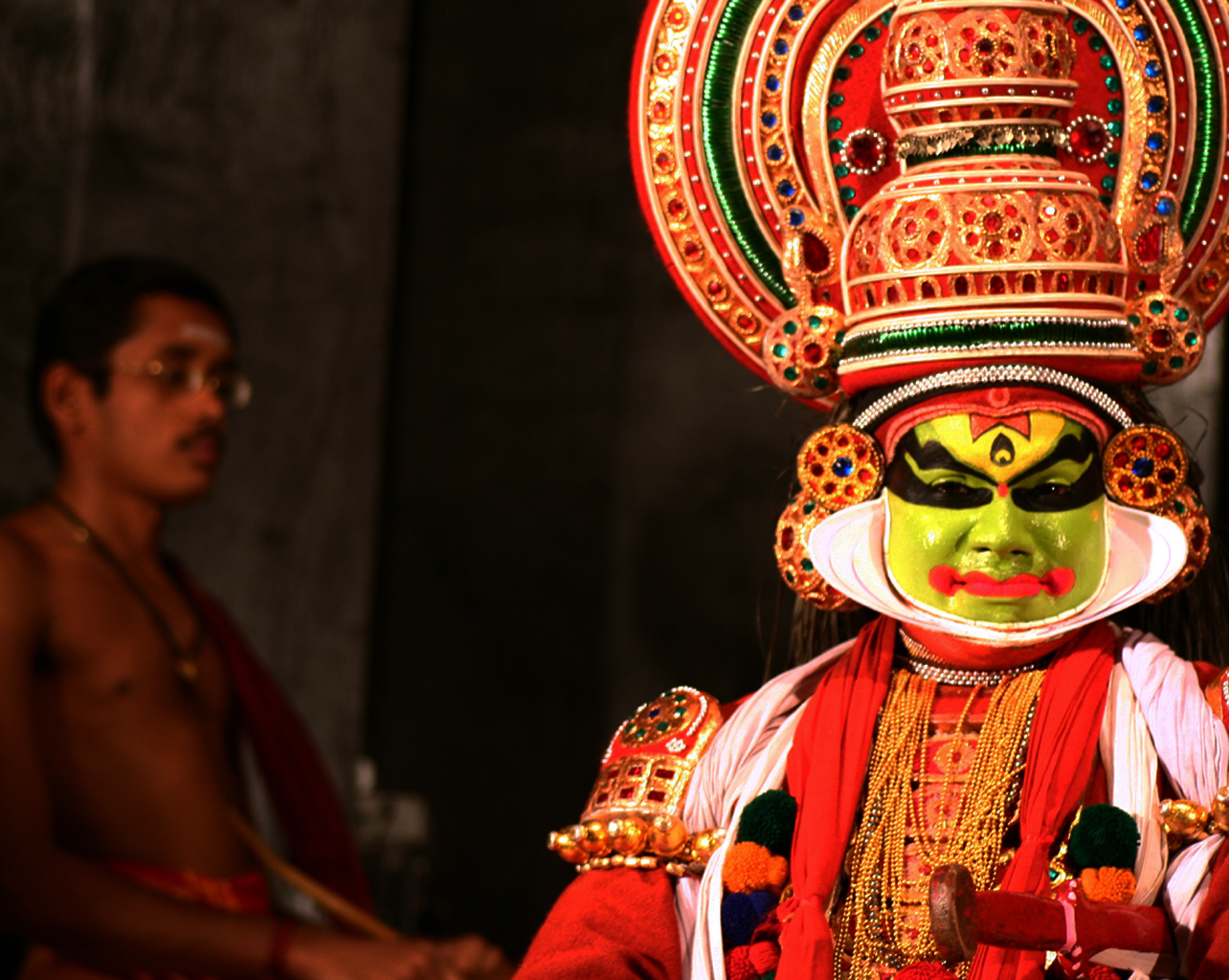 Kathakali Performance